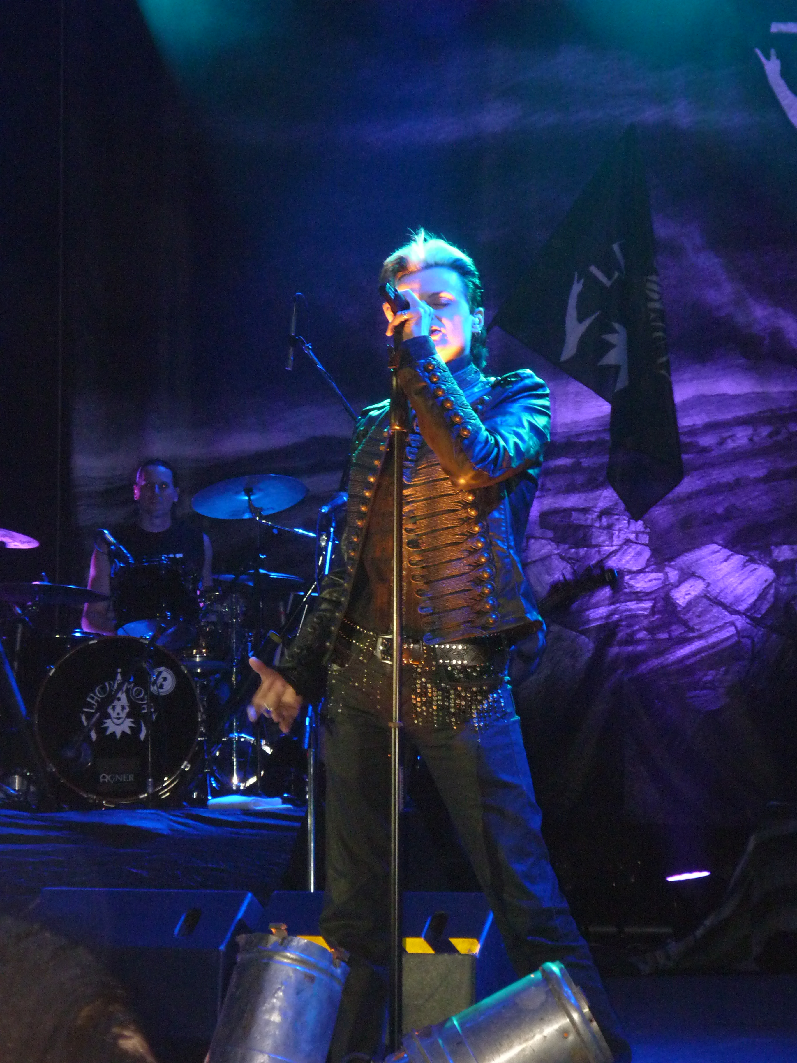 Tilo Wolff, lider de la banda Lacrimosa, en el concierto de Puebla en el Teatro La Paz